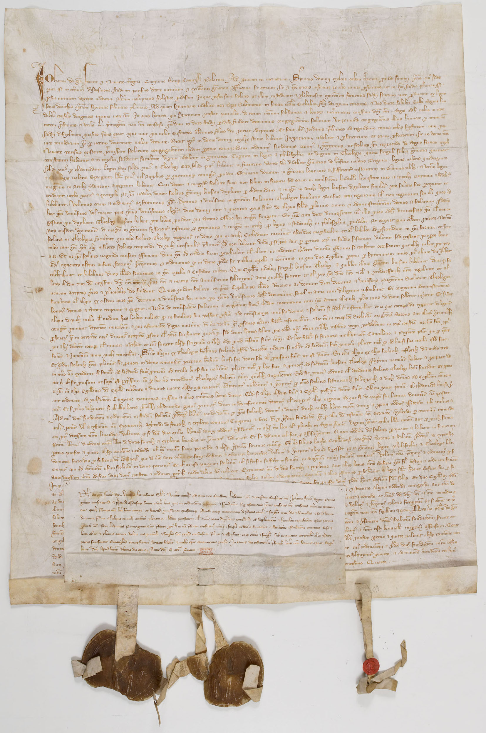 Acte de la reine Jeanne de Navarre fondant un collège à Paris et charte de son mari le roi Philippe le Bel attestant que leur fils Louis a donné son accord à cette fondation et la respectera, scellés ensemble de leurs trois sceaux à Vincennes le 25 mars 1305.